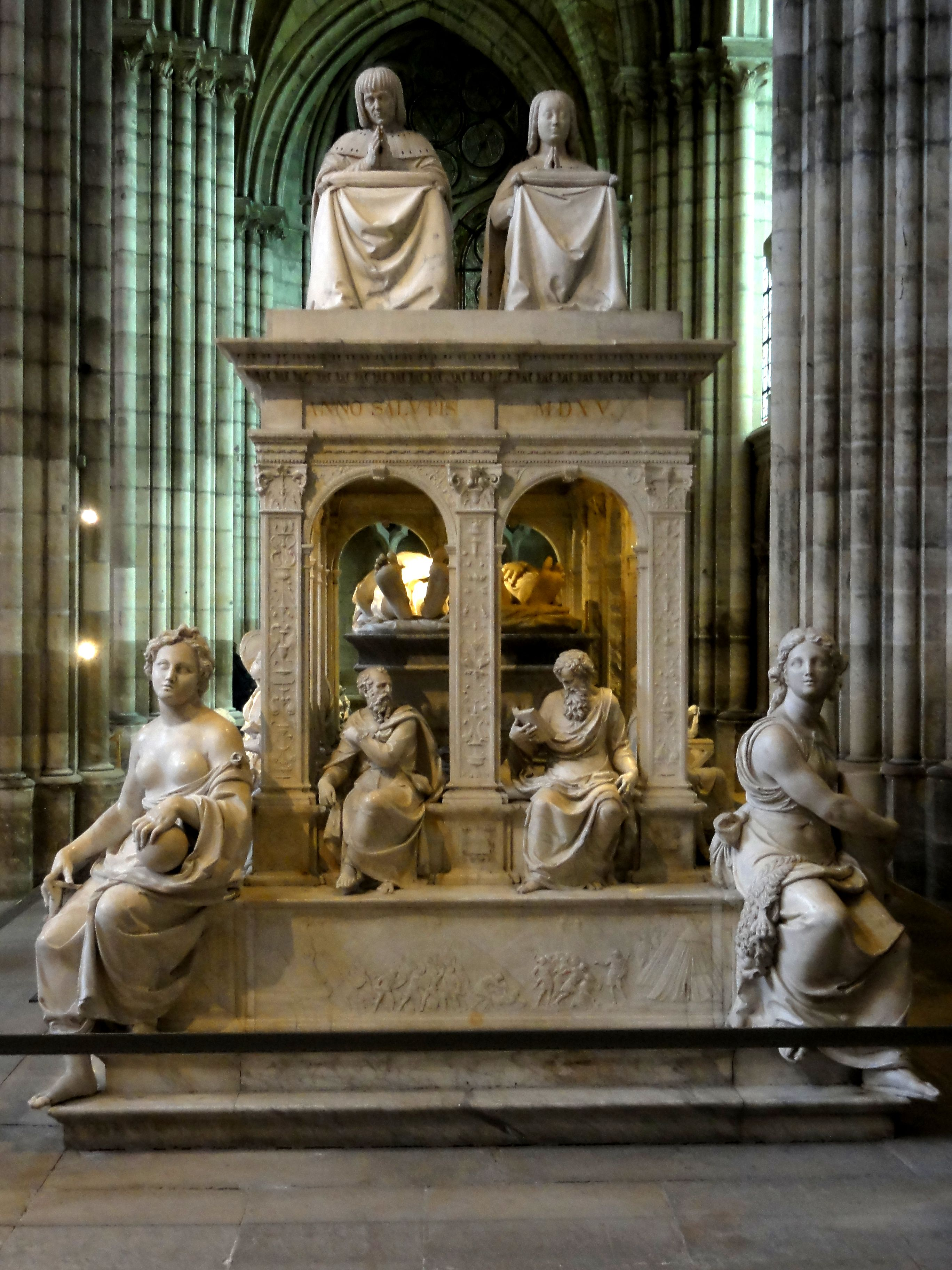 Vue depuis l'est.